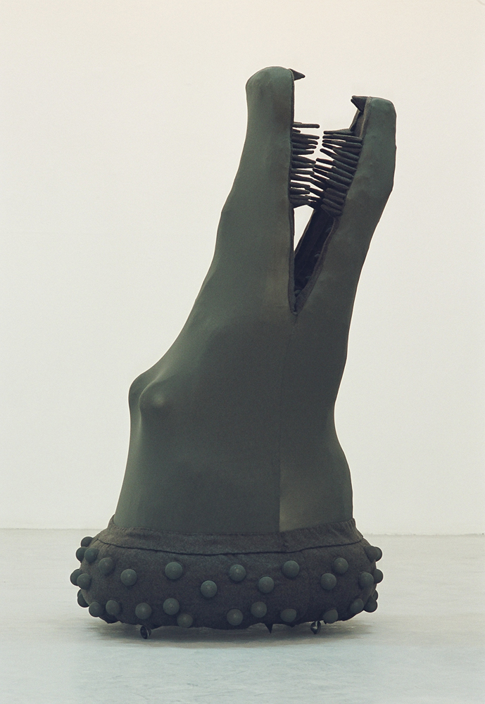 תנין עבודה